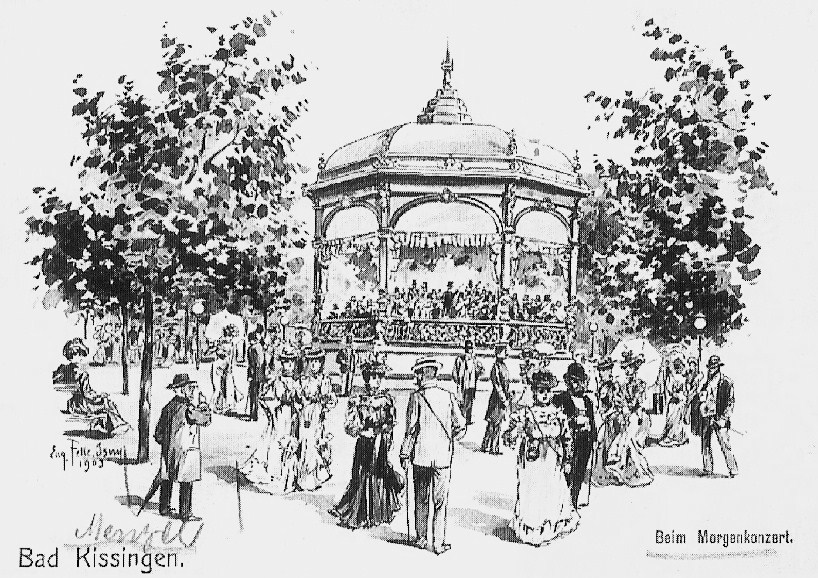 Beim Morgenkonzert (1903) von Eugen Felle (1869-1934): Kurgäste vor dem Bad Kissinger Musikpavillon (erbaut 1899); die Zeichnung zeigt den Maler von Adolph von Menzel (links) als häufigen Kurgast Bad Kissingens